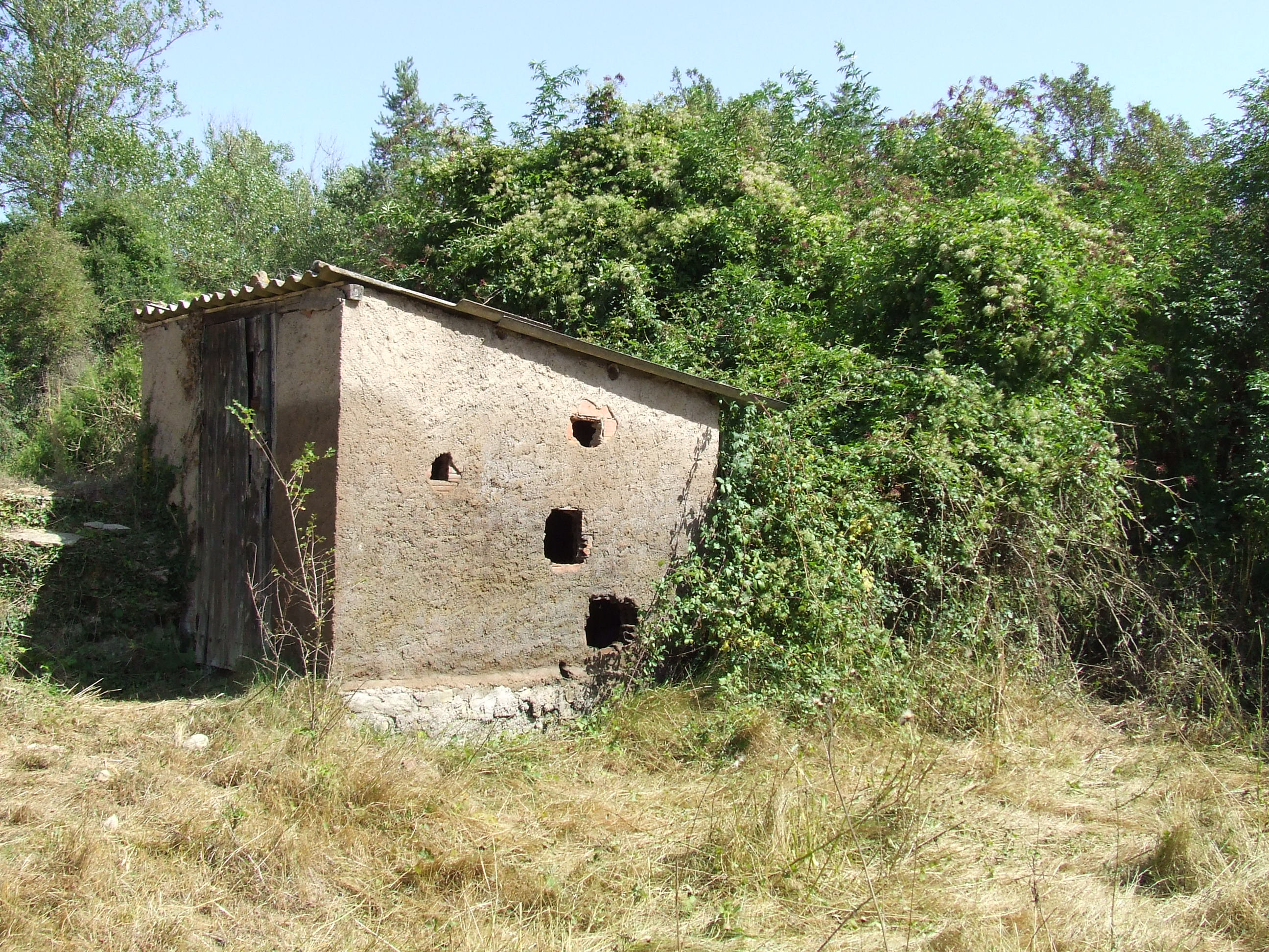 Font de Cal Fantasia (Castellcir, Moianès)